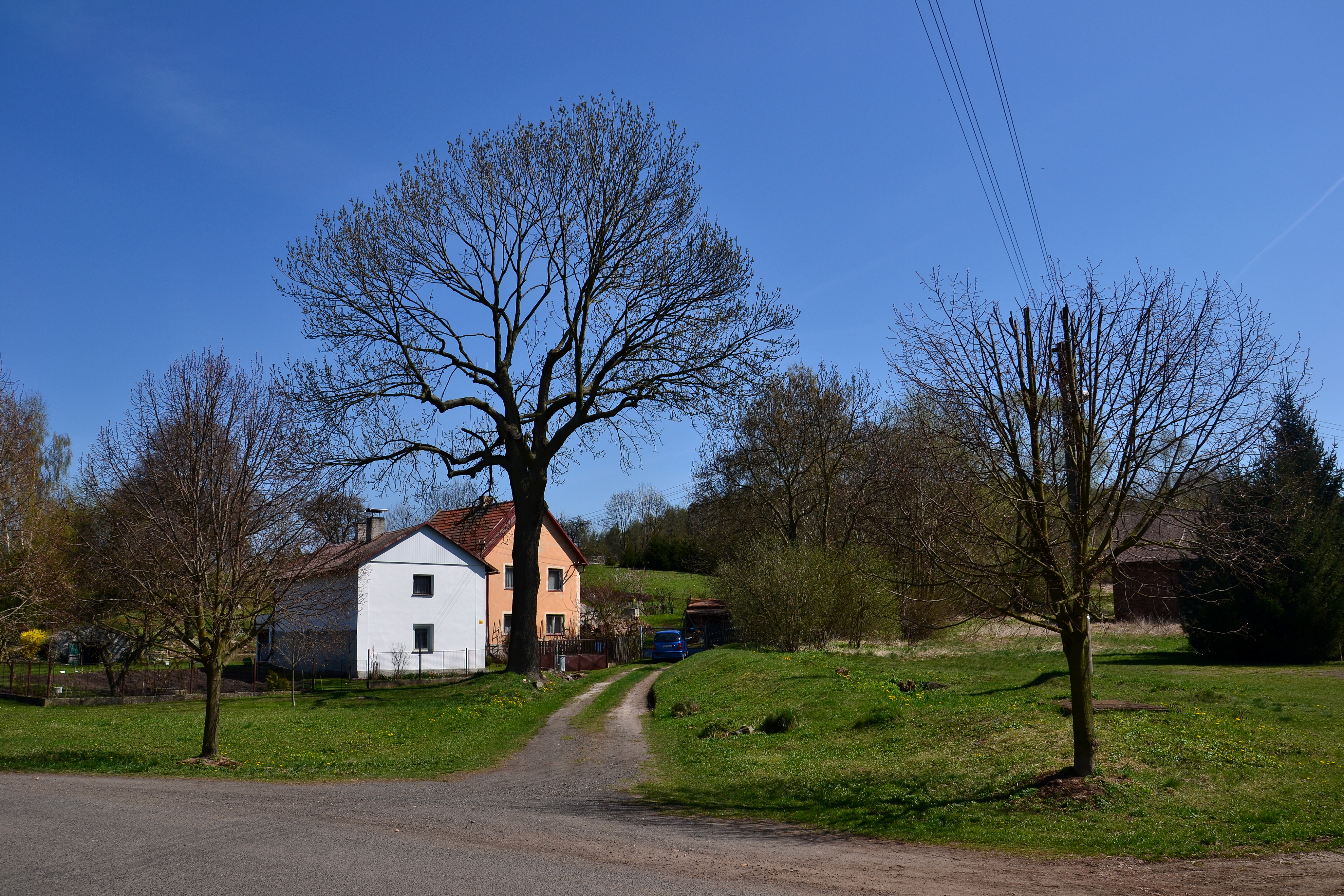 Radechov - dům čp. 5